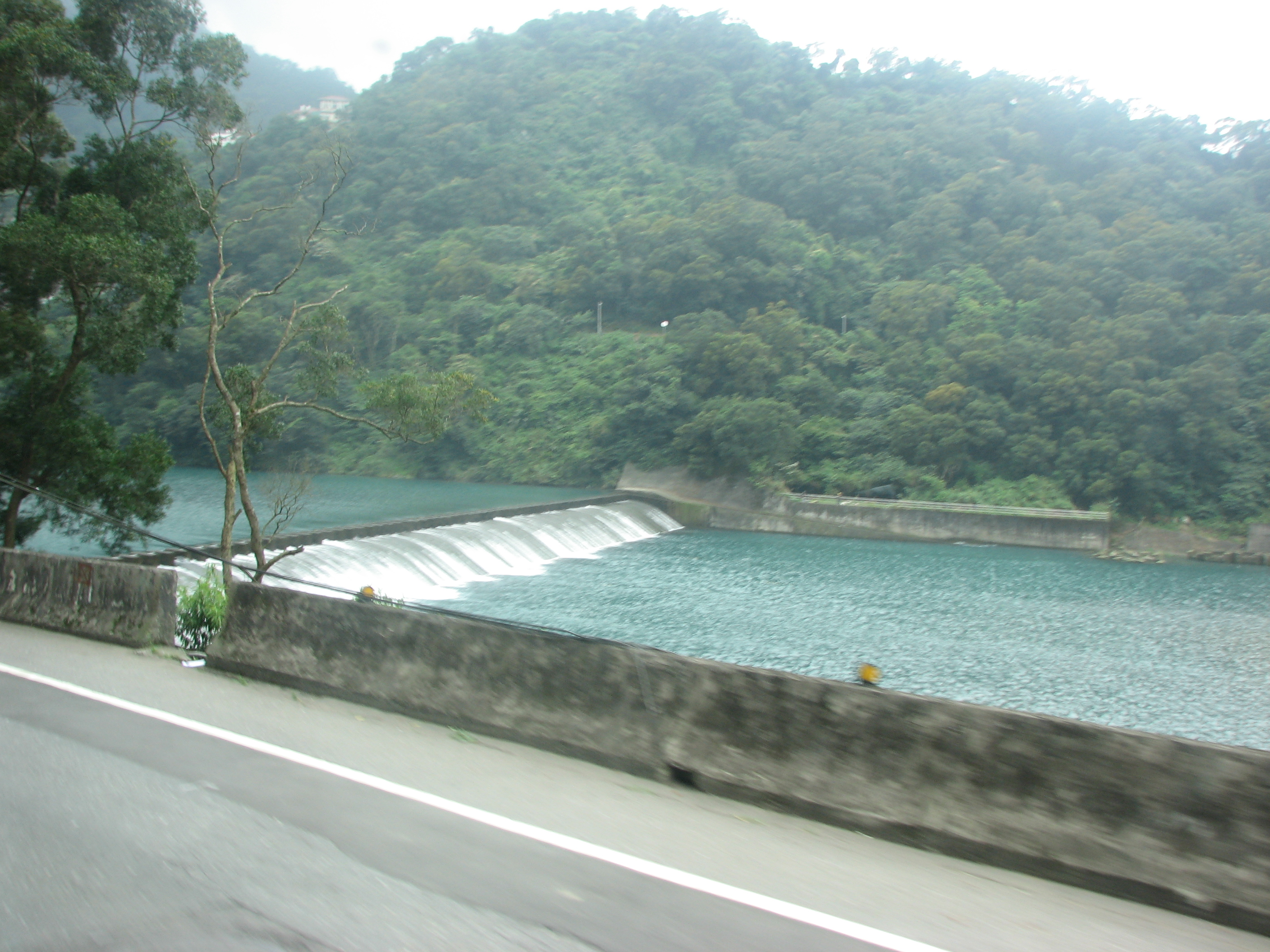 位於新烏路上的粗坑壩